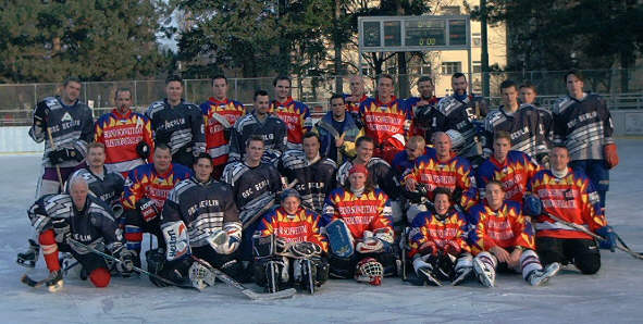 Die Berliner Landesliga - eine bunter und netter Haufen